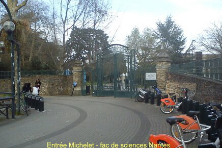 entrée de la faculté des sciences de Nantes, coté boulevard Michelet